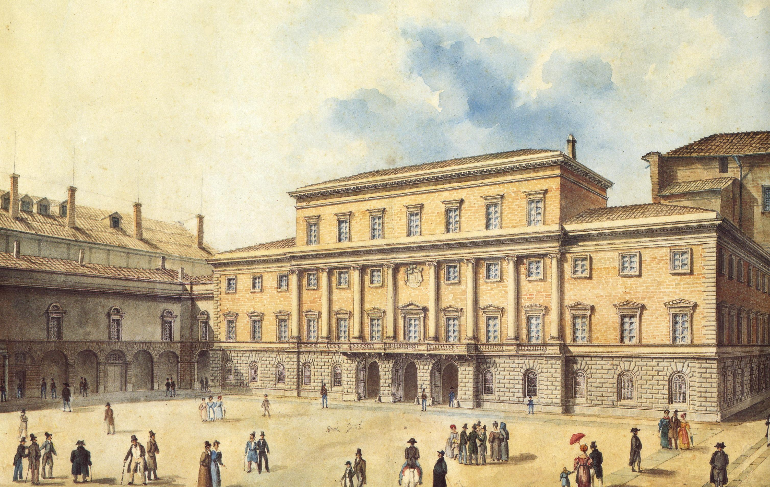 Veduta del Palazzo Ducale e della Pilotta, acquerello di Giacomo Giacopelli. Biblioteca Palatina di Parma.